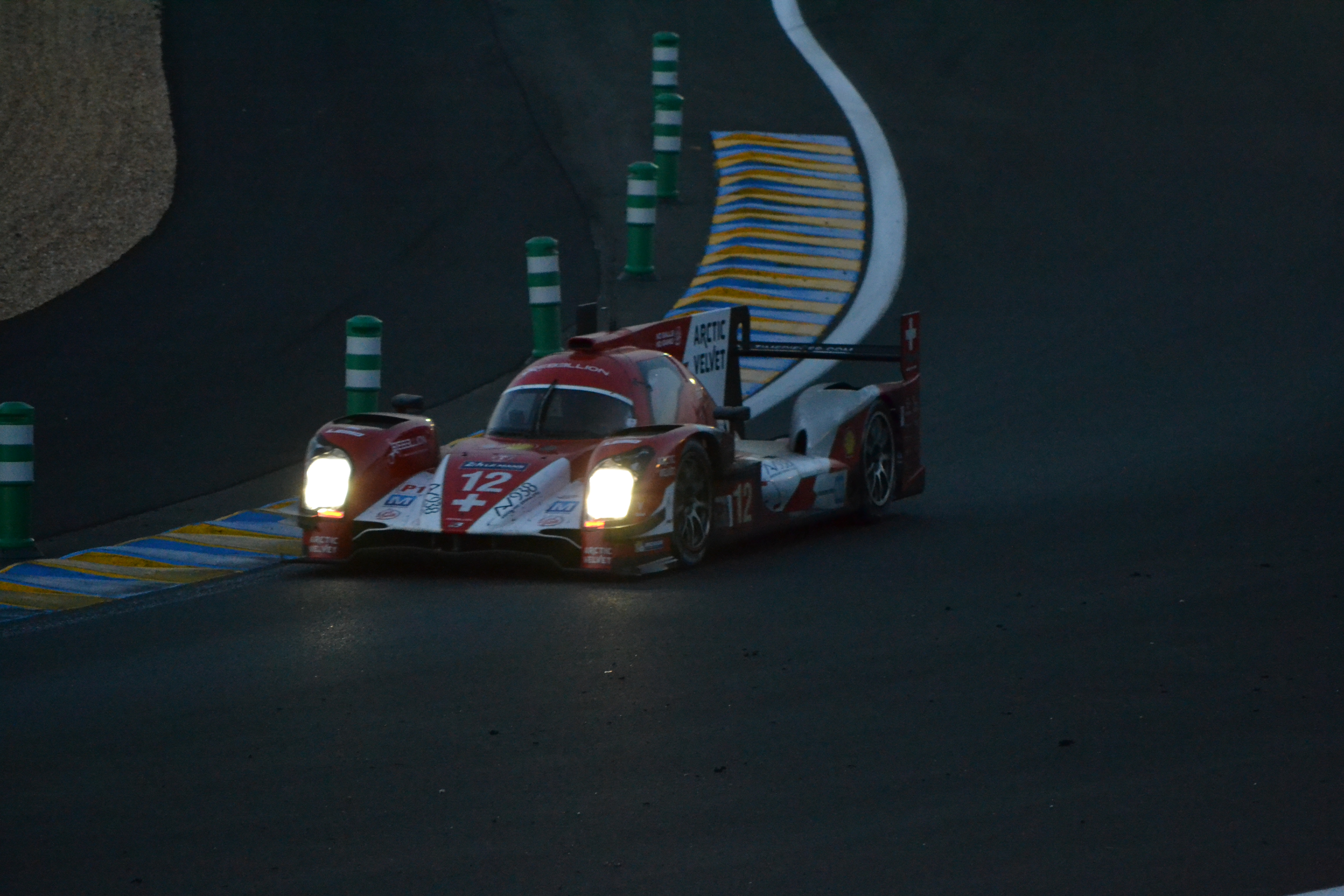 La Rebellion R-One n°12 de Rebellion Racing, dans les esses de la forêt, lors des 24 Heures du Mans 2014.